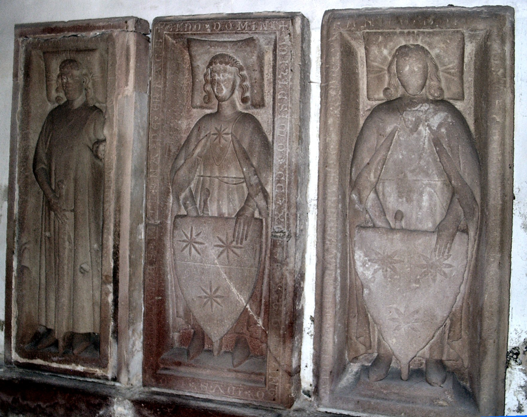 Erbach (Odenwald), Schloss